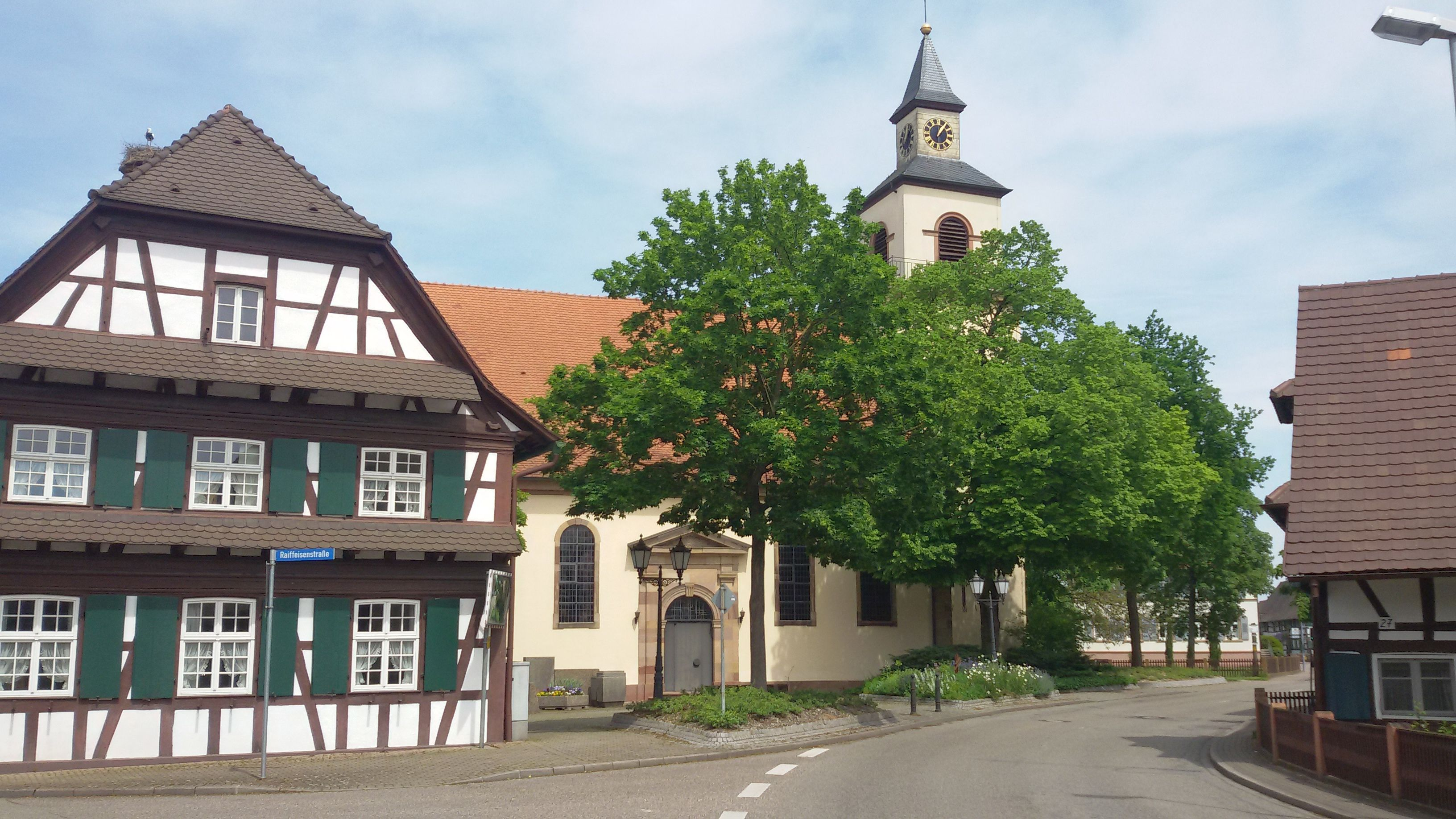 Südlicher Blick auf die Kirche. Links im Vordergrund das alte Rathaus.